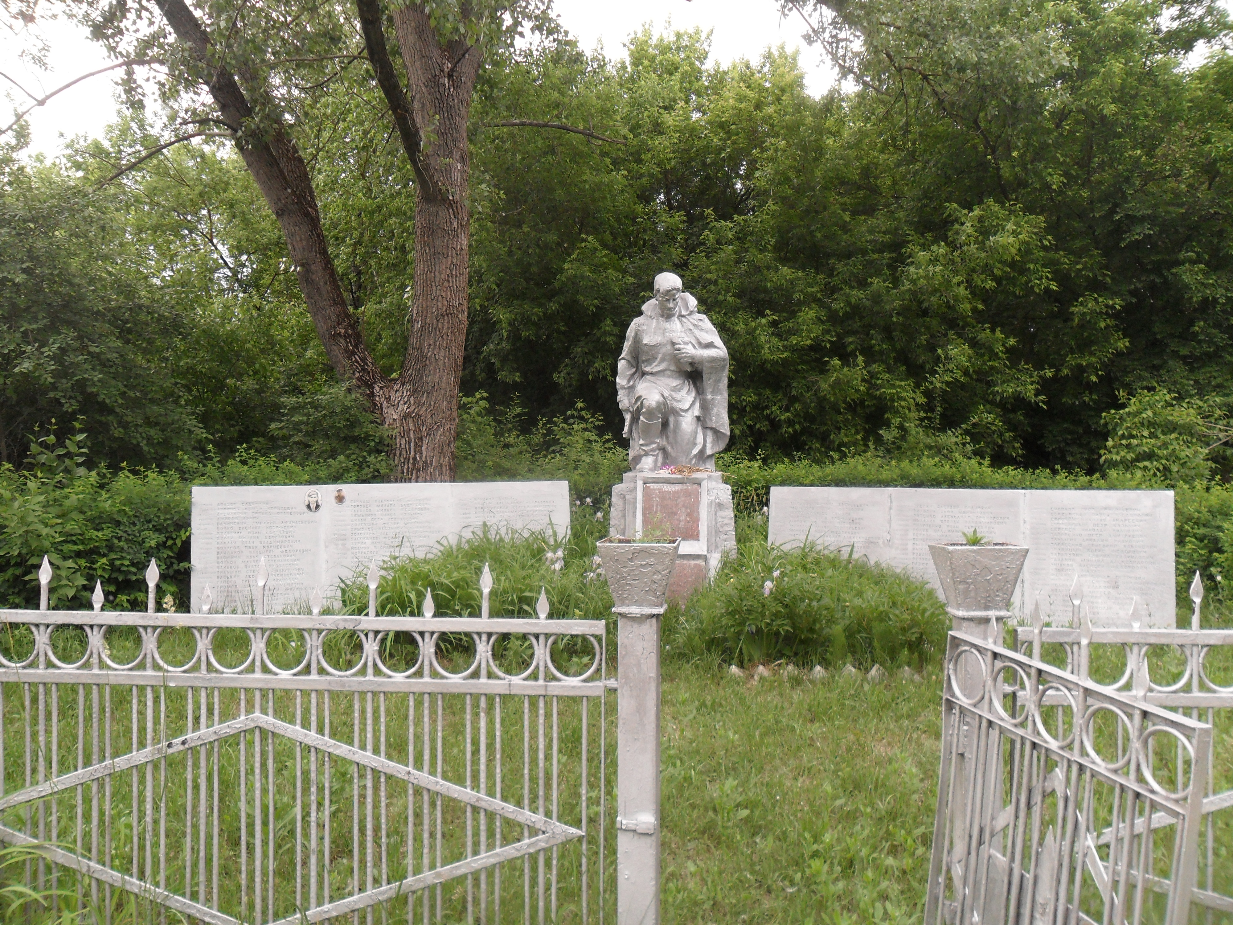 Военный мемориал в селе Залесье Чернобыльского района (территория зоны отчуждения).